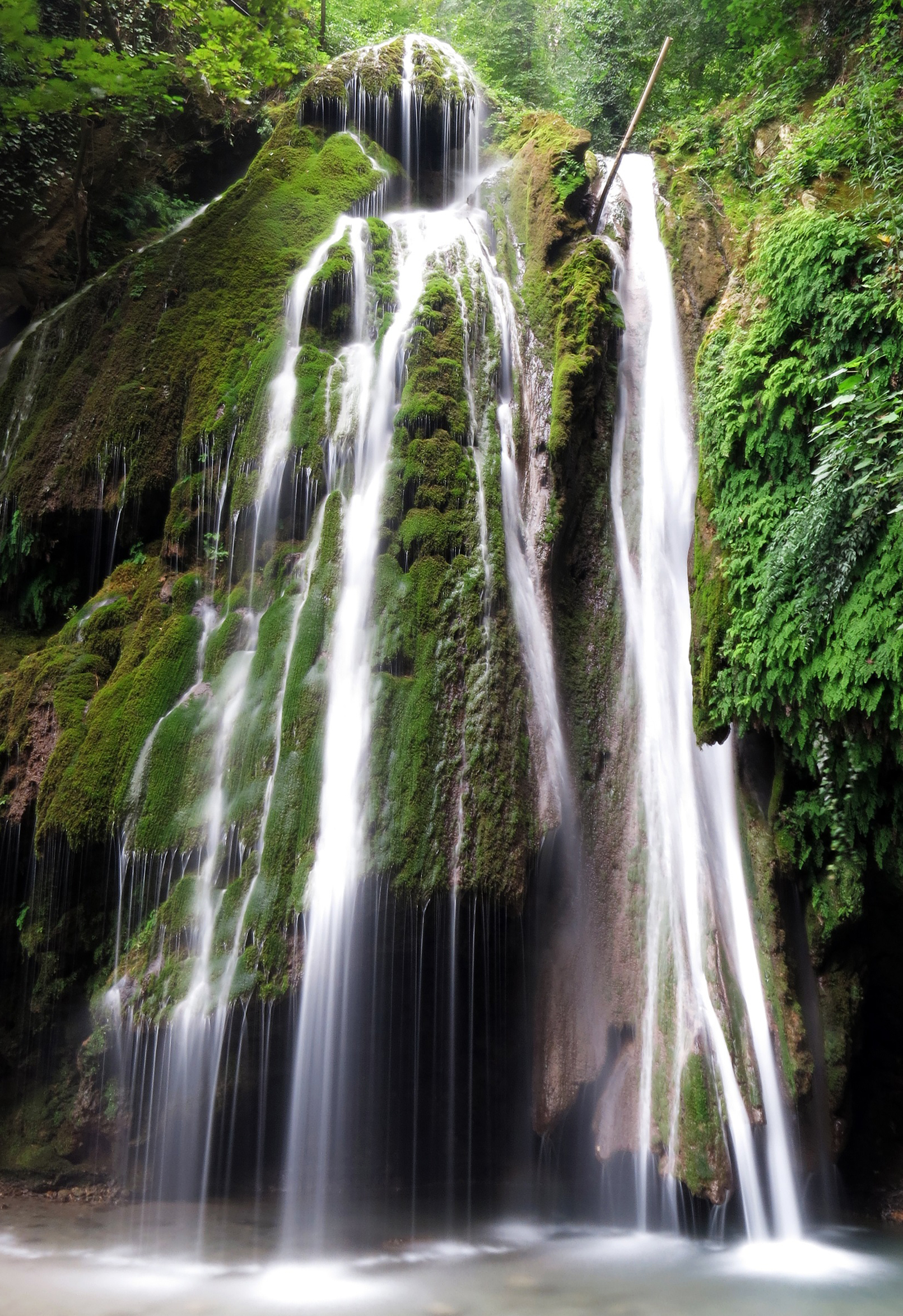 شلال كبودوال في غابة توسكستان بِمُحافظة گلستان الإيرانيَّة.